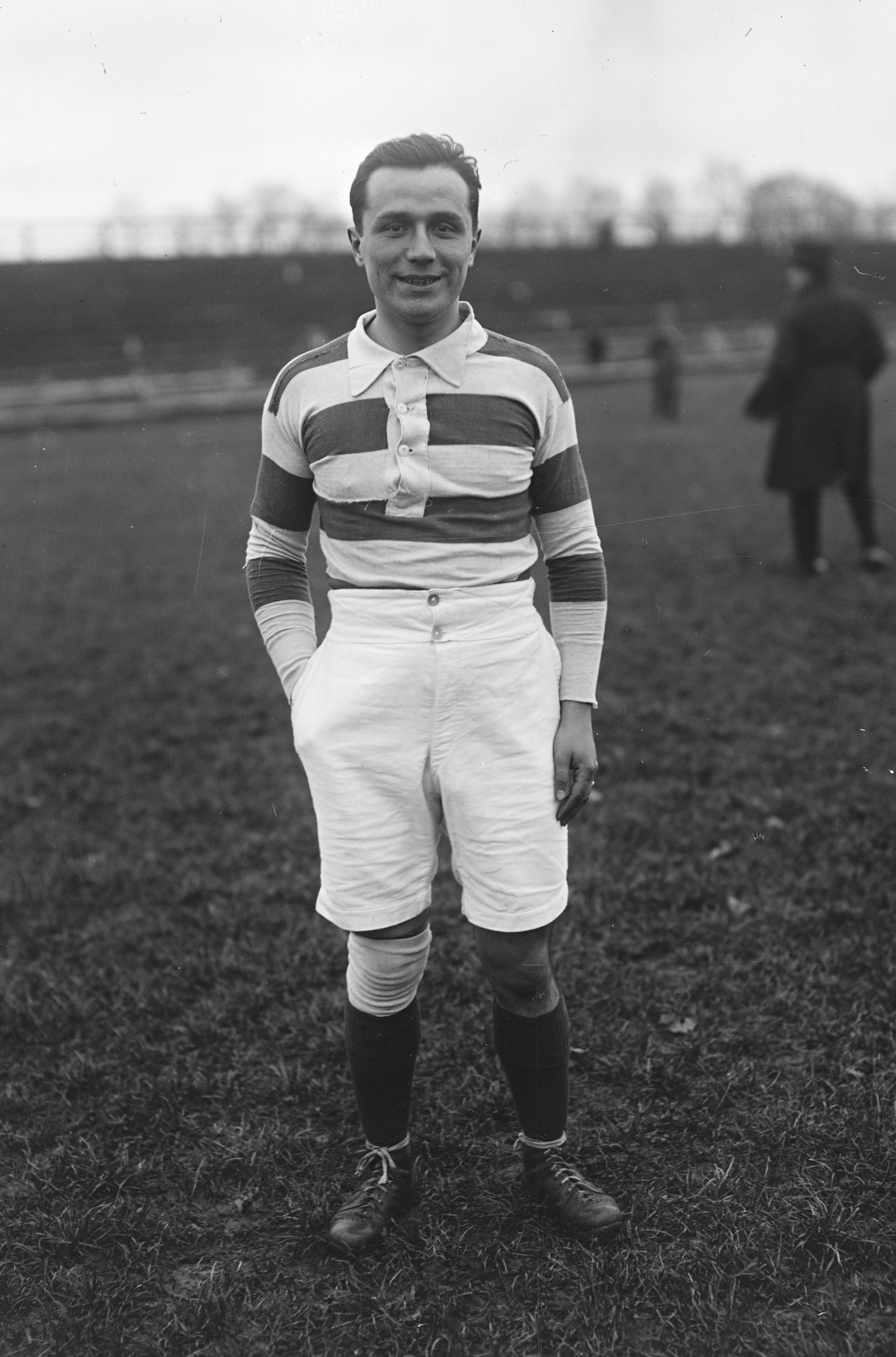 René Crabos le 1er janvier 1922 au stade de Colombes.